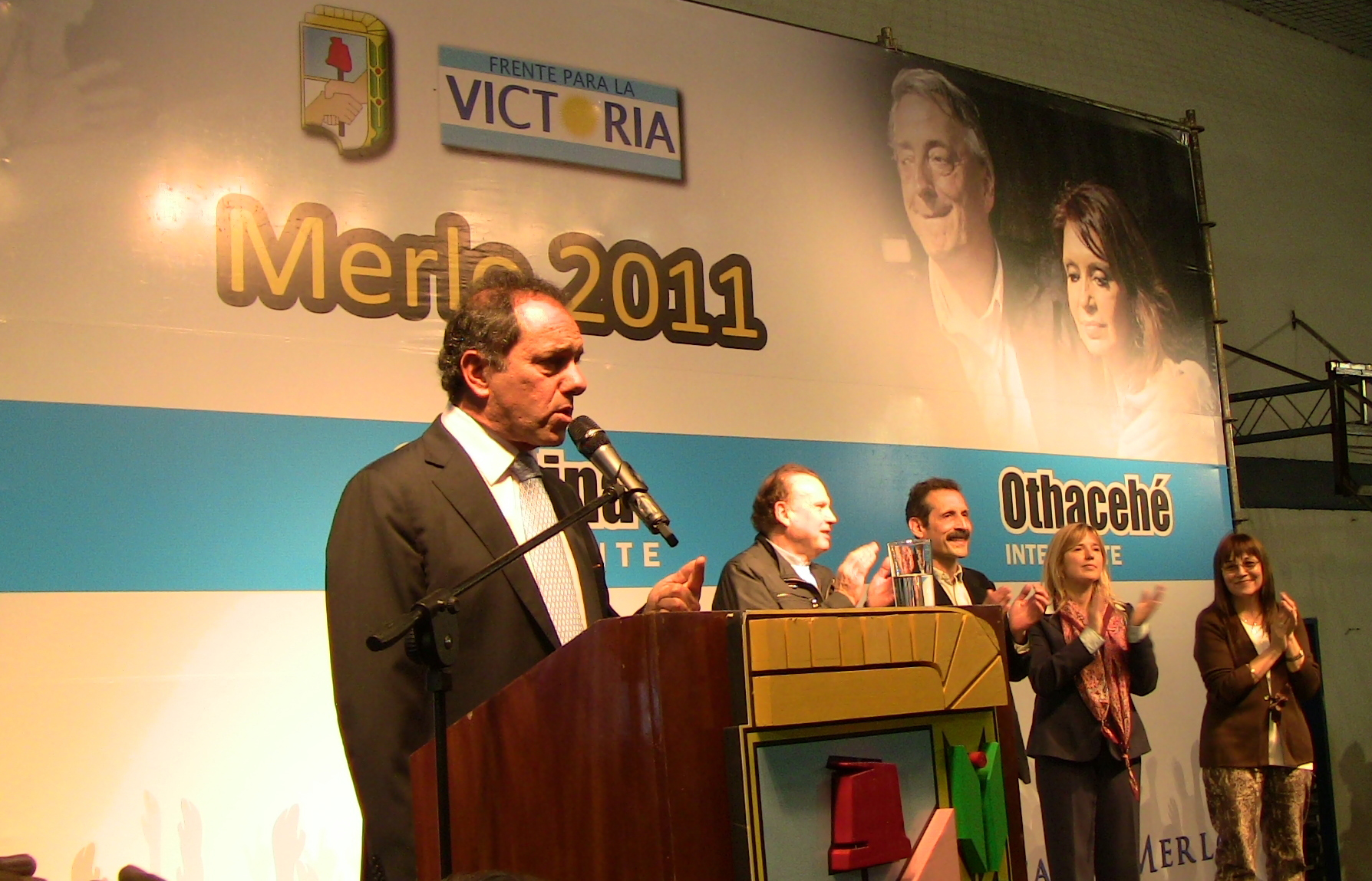 Visita de Daniel Scioli a Merlo el 28 de julio de 2011